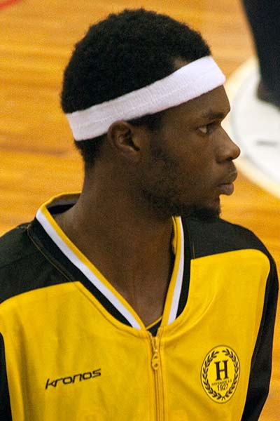 Brent Petway